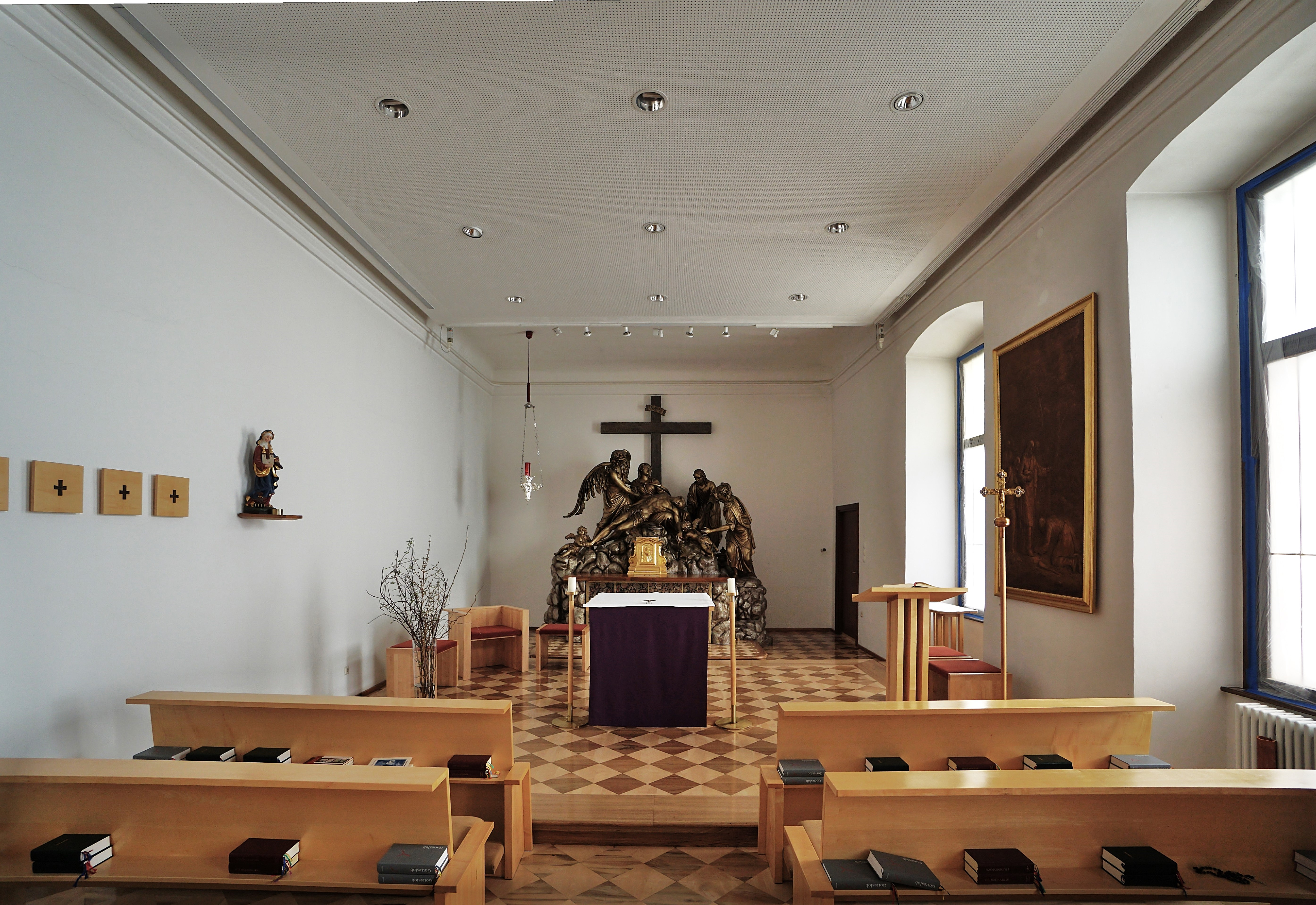 Bischöfliche Residenz (Klagenfurt), Innenansicht der Kapelle